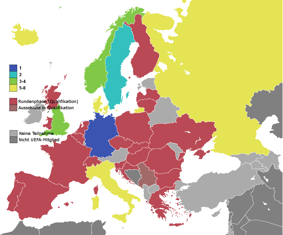 Abschneiden der Nationalmannschaften bei der Fußball-Europameisterschaft der Frauen 1995